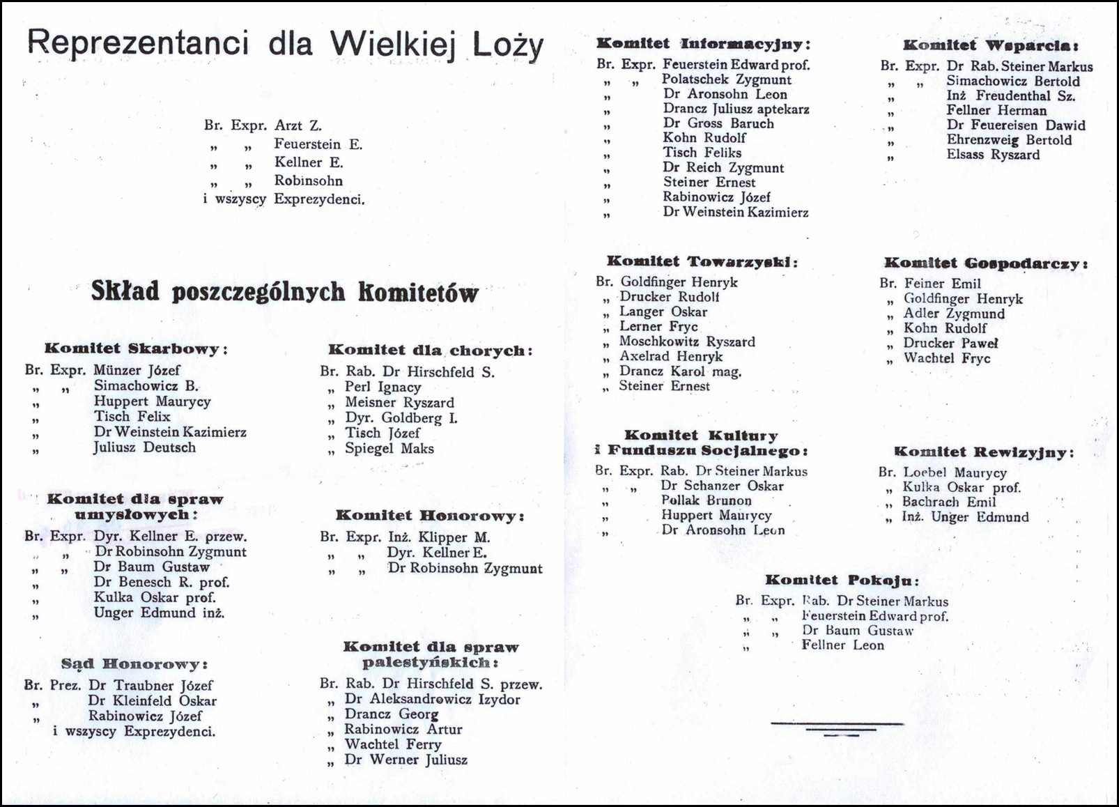 Reprezentanci do Wielkiej Loży B'nai B'rith Bielsko